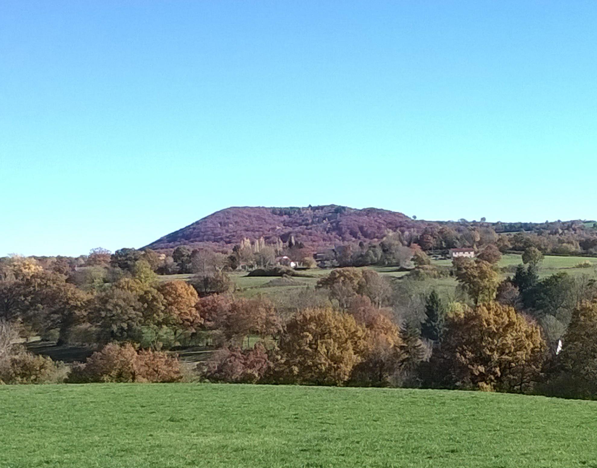 Vue du Puy de Chalard côté Nord Ouest